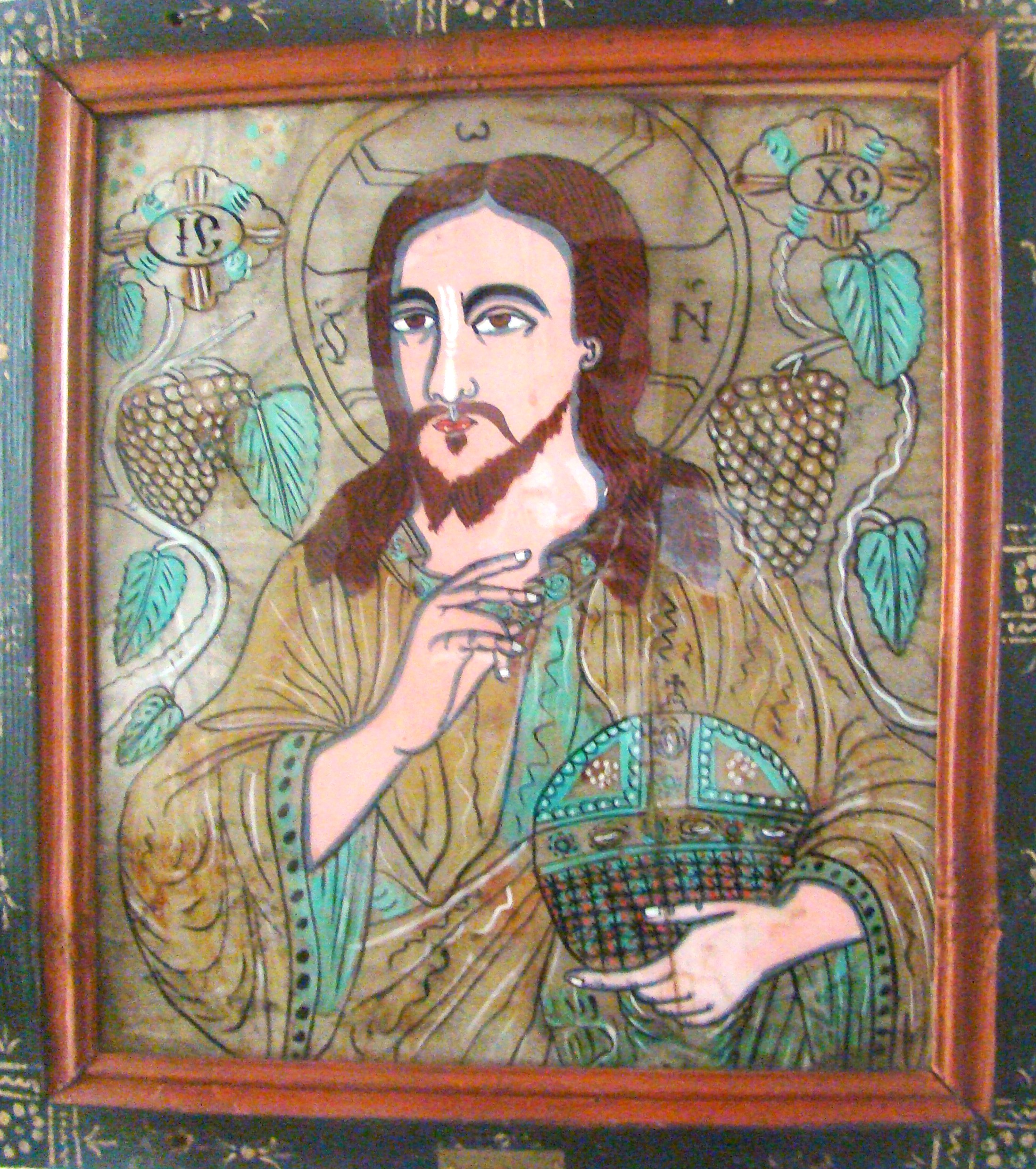 Muzeul de icoane pe sticlă „Pr.Zosim Oancea” din Sibiel